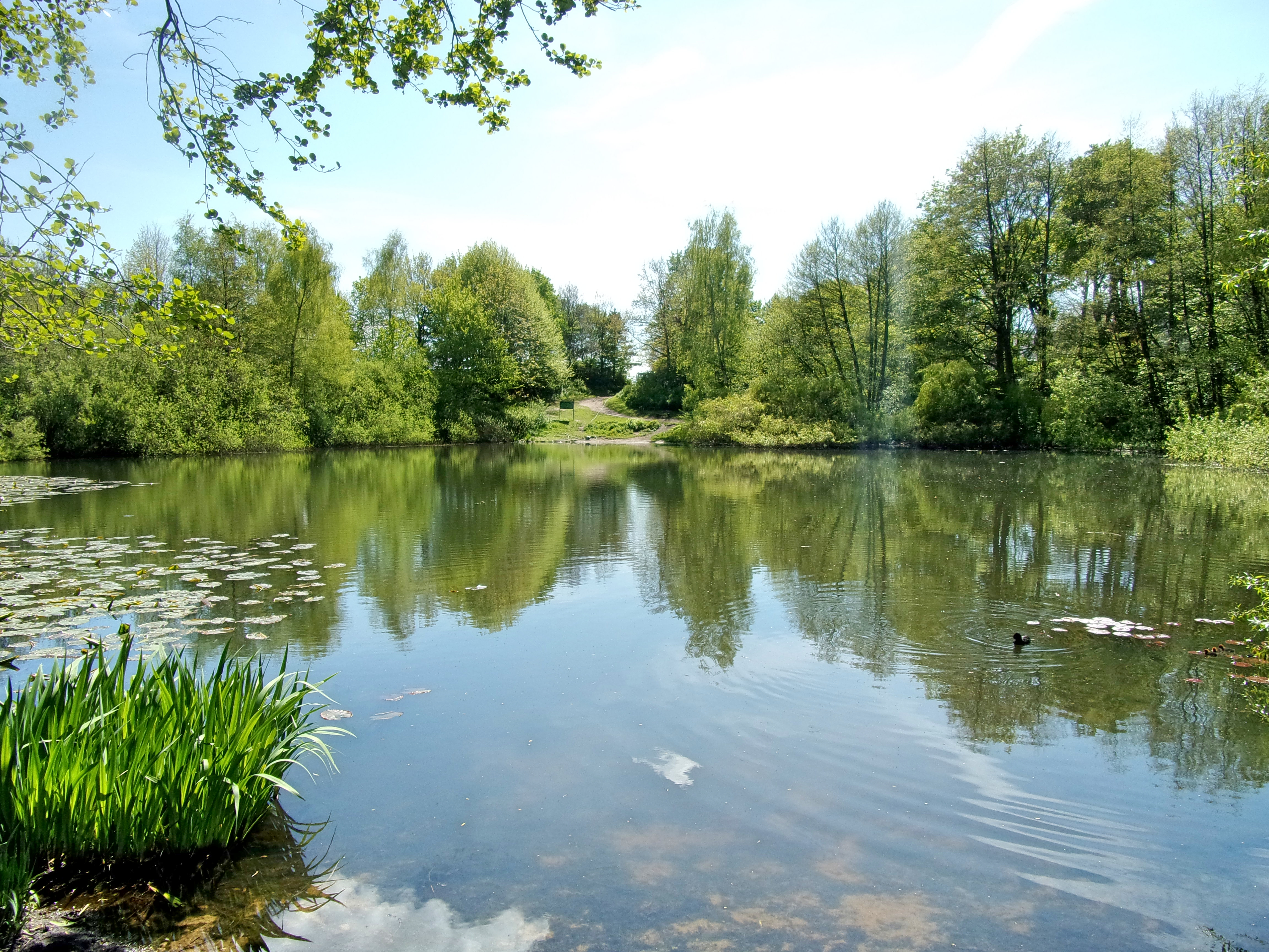 Der Bahrenfelder See im gleichnamigen Hamburger Stadtteil ist eingetragen in der Liste der Hamburger Geotope unter Punkt 2 mit überregionaler Bedeutung und Landschaftsschutzgebiet. Er entstand durch einen Erdfall. Foto vom Ufer am Zugang Theodorstraße mit Blick über den See in Richtung Osdorfer Weg.